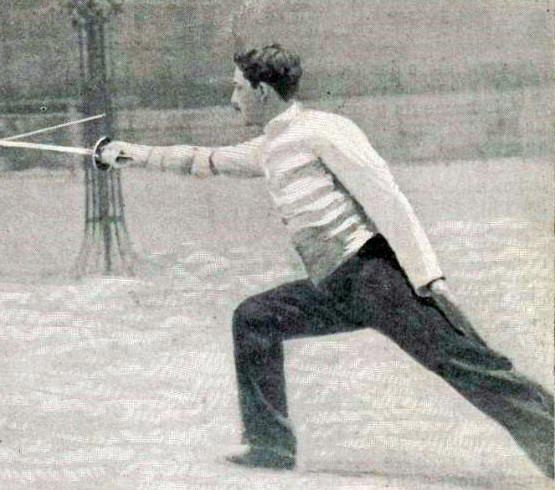 Émile Ayat, double champion olympique à l'épée en 1900.